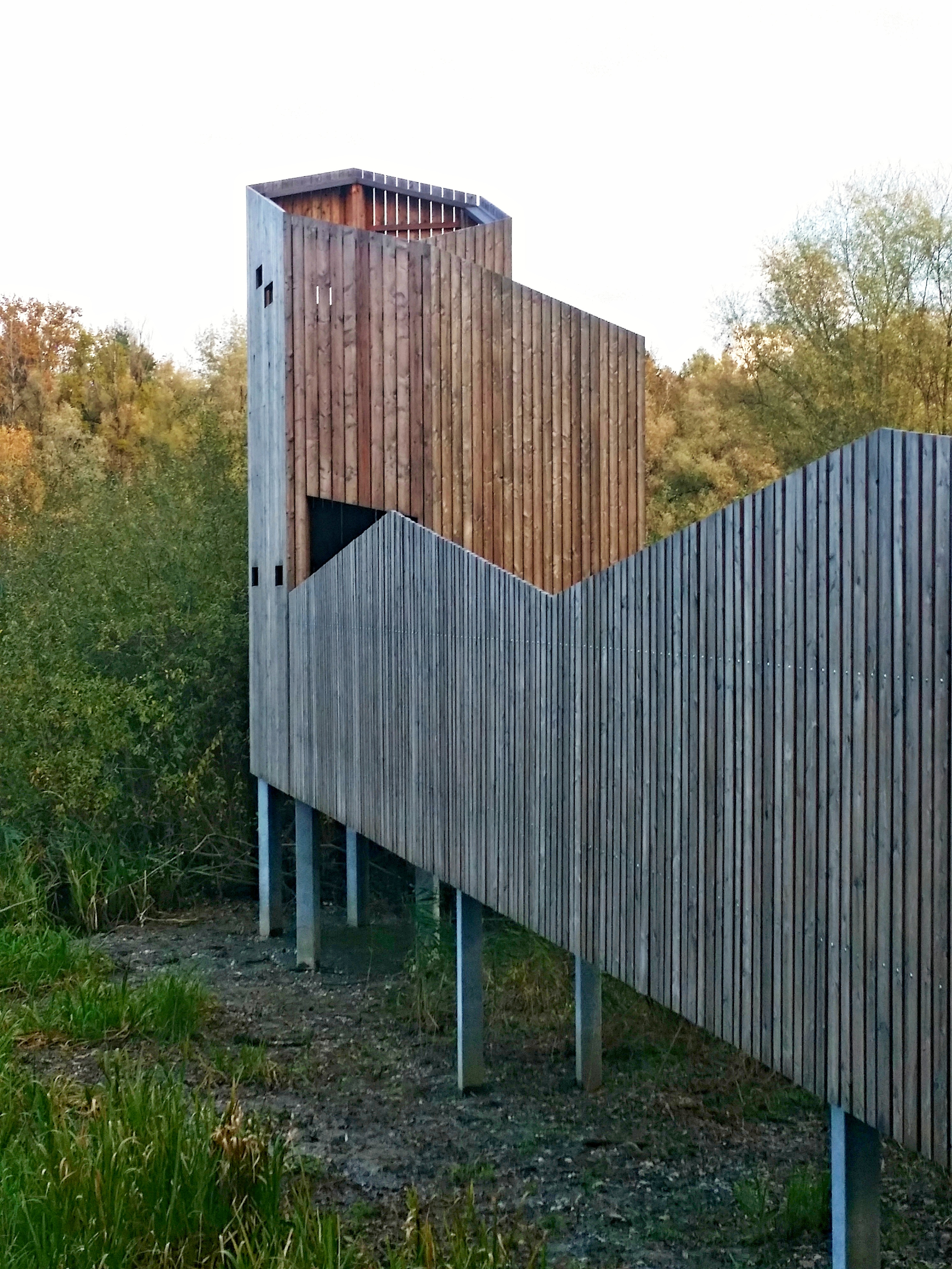 Vogelbeobachtungsturm Bisenwäldeli